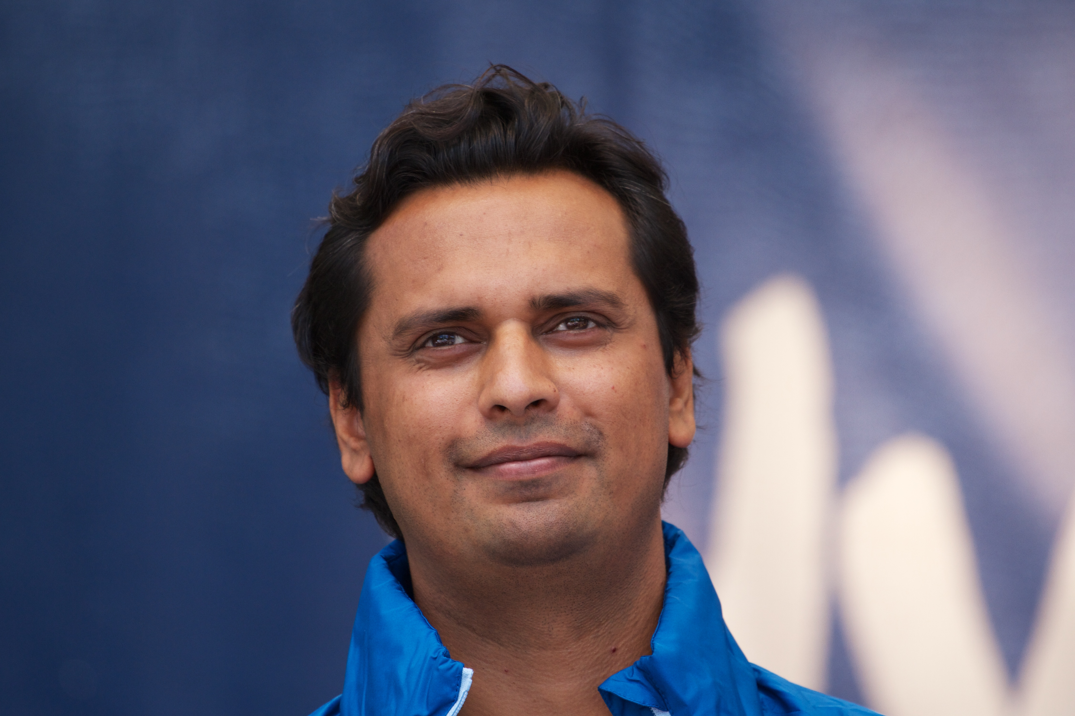 Mudassar Kapur